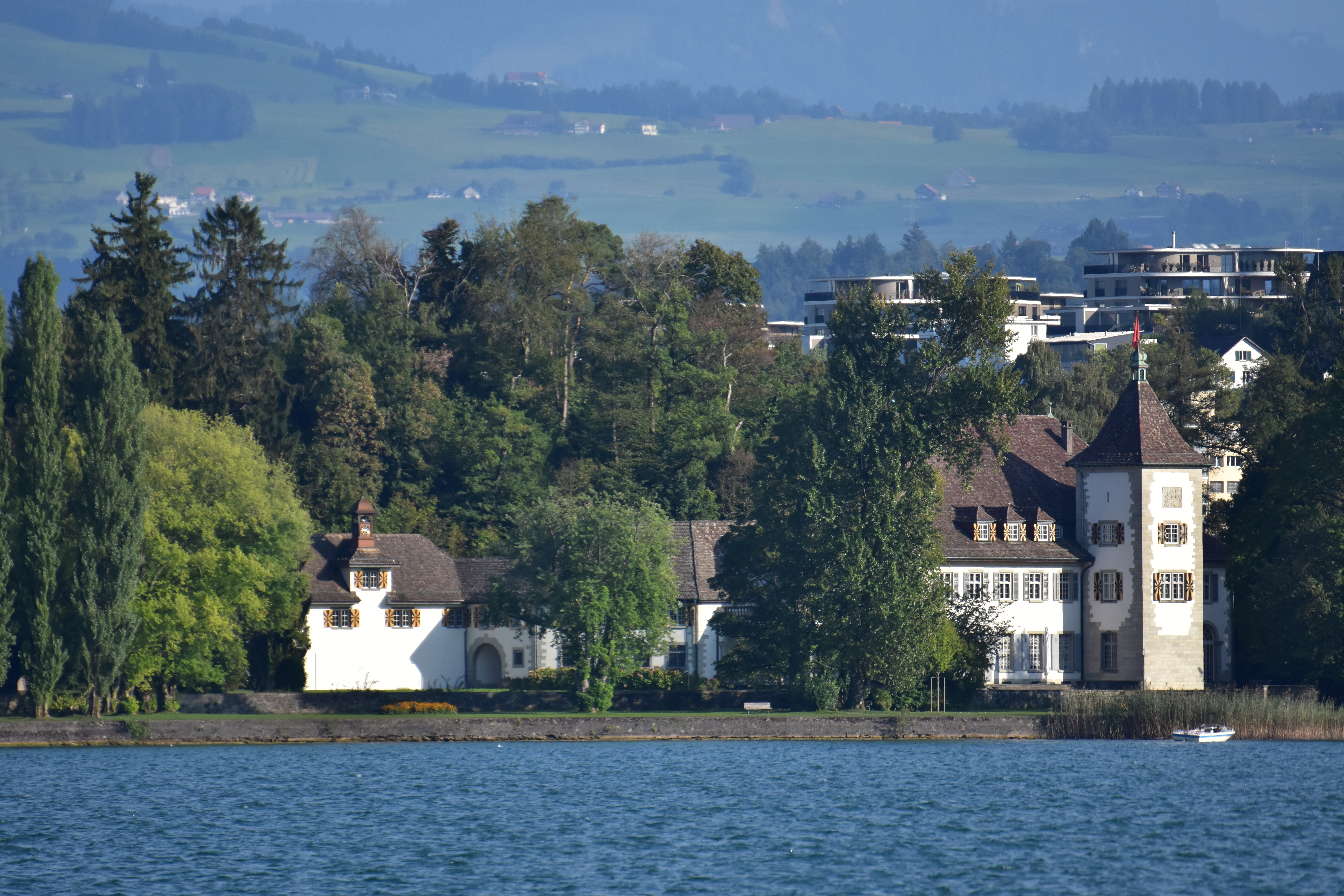 Au peninsula and Werdmüller estate in Au as seen from Zürichsee-Schiffahrtsgesellschaft (ZSG) ship MS Helvetia on Zürichsee in Switzerland